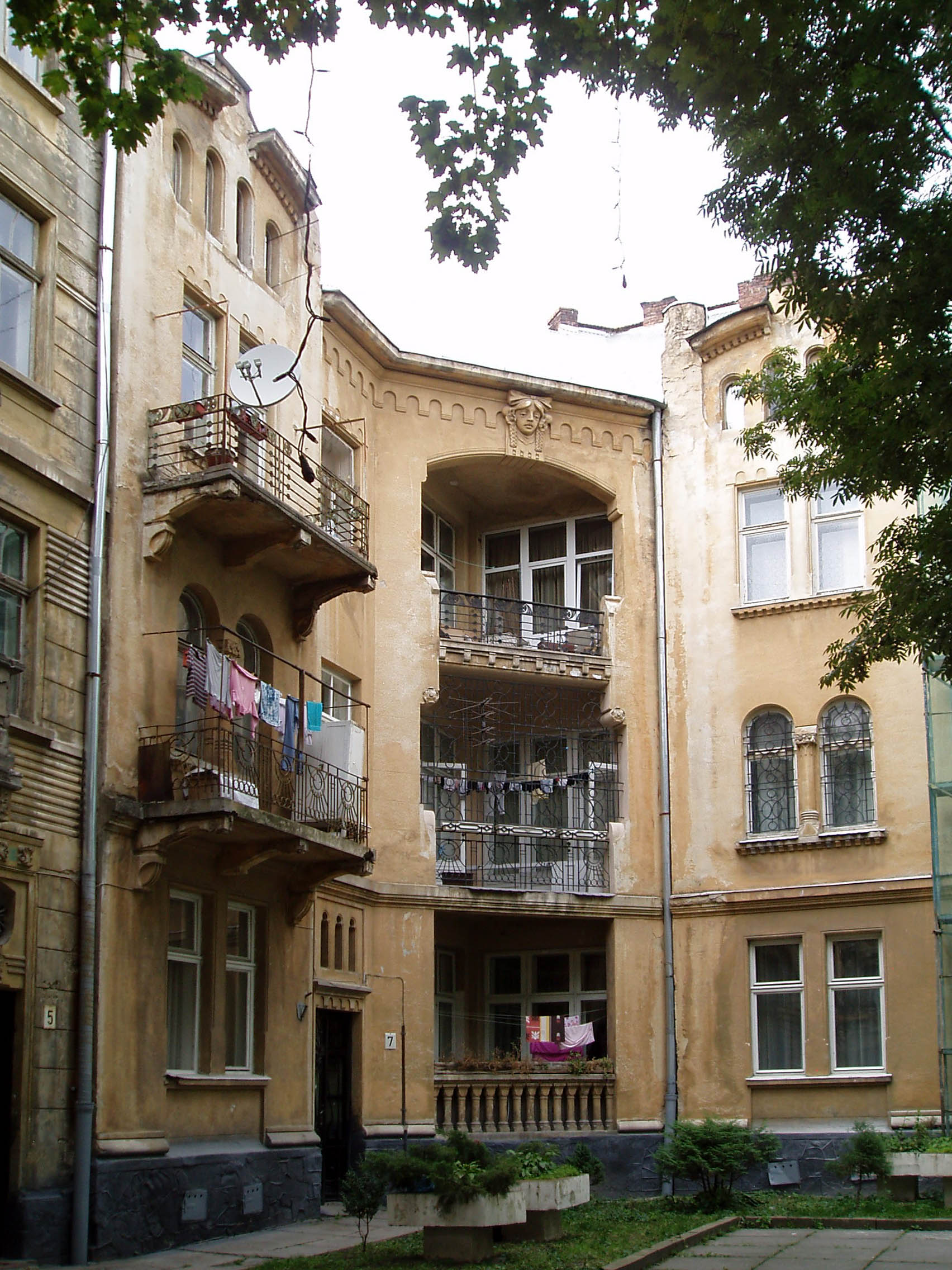 Будинок № 7 на вулиці Богомольця у Львові